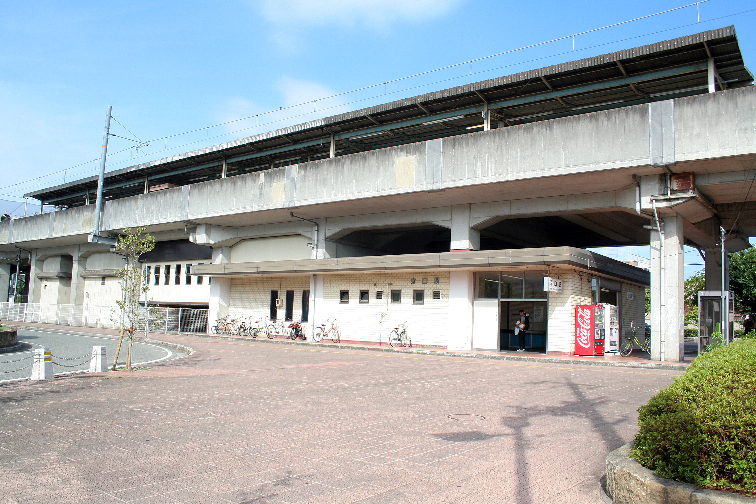 京口駅。播但線の鉄道駅。 西側から見た駅。